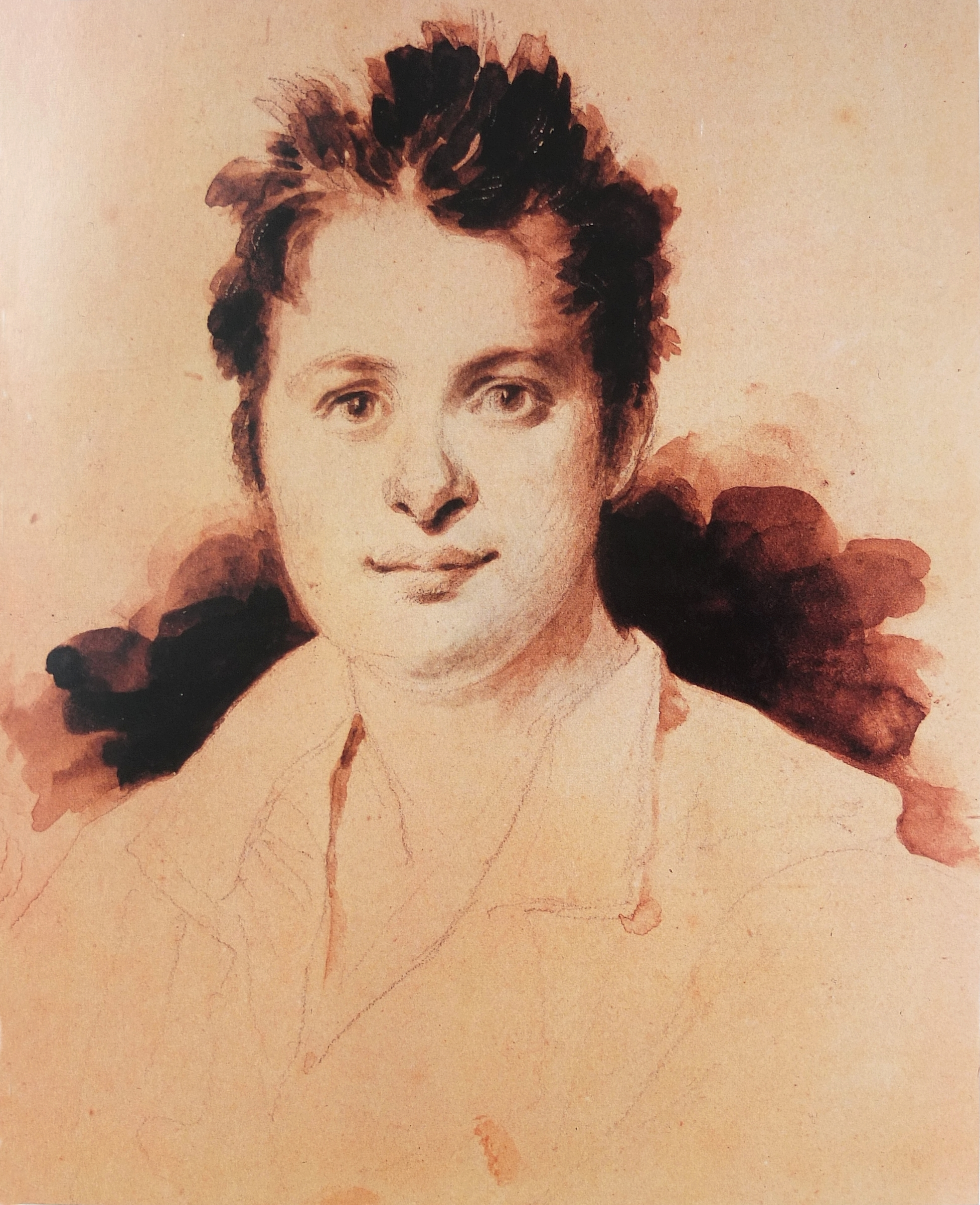 Balzac jeune, lavis par Achille Devéria, Institut de France, Paris